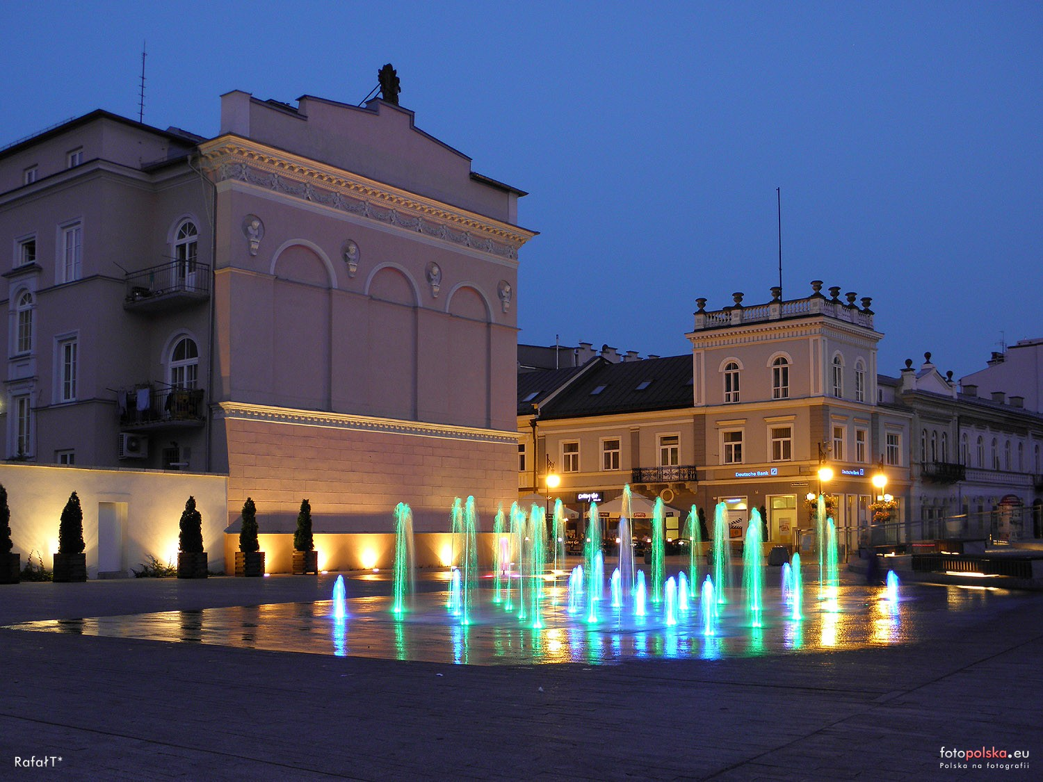 Plac przed budynkiem Towarzystwa Kredytowego Ziemskiego nocą - widok w kierunku ściany szczytowej domu Podworskich